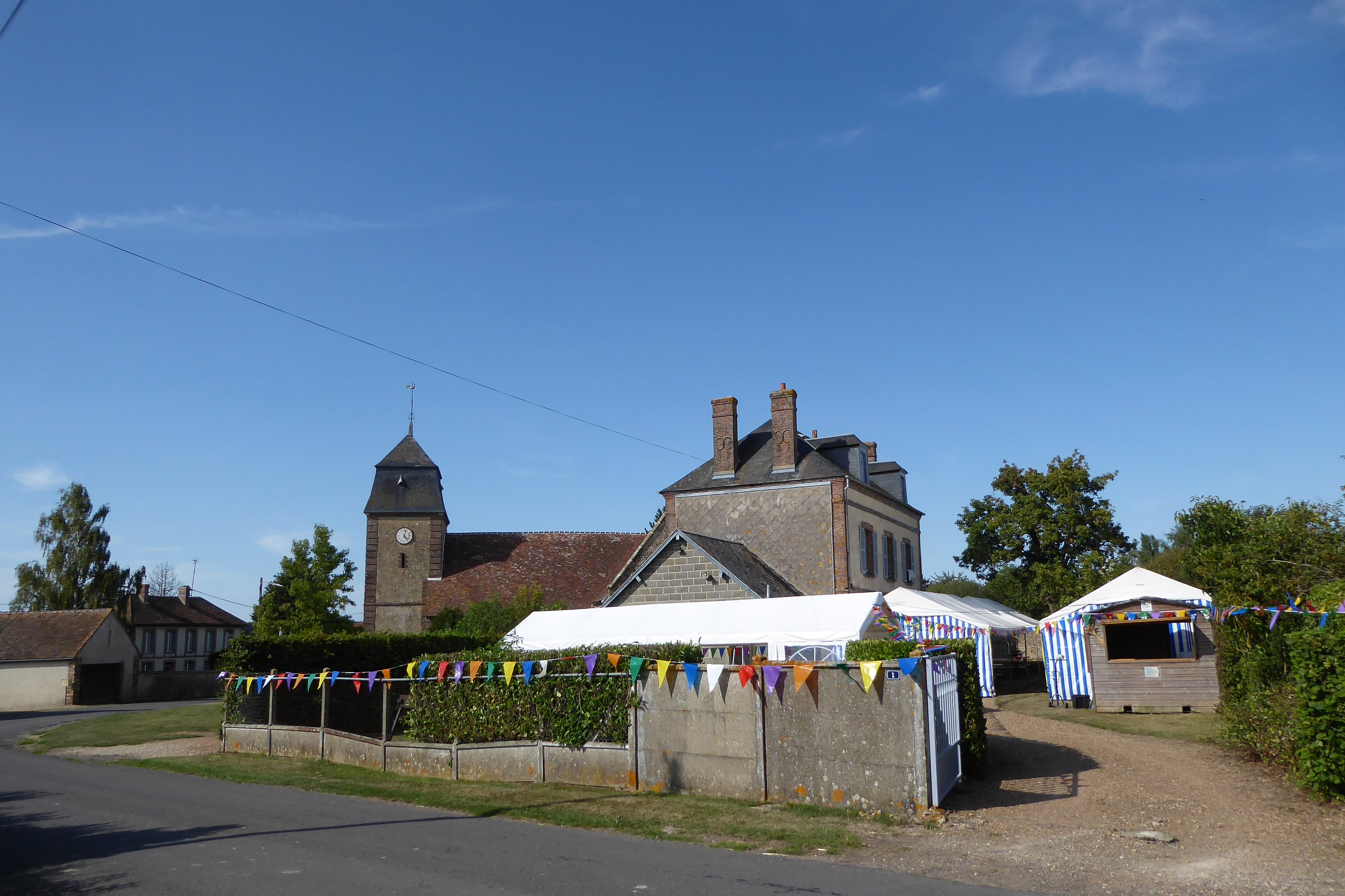 Préparation de la fête et église Saint-Martin à Rohaire, Eure-et-Loir, France.